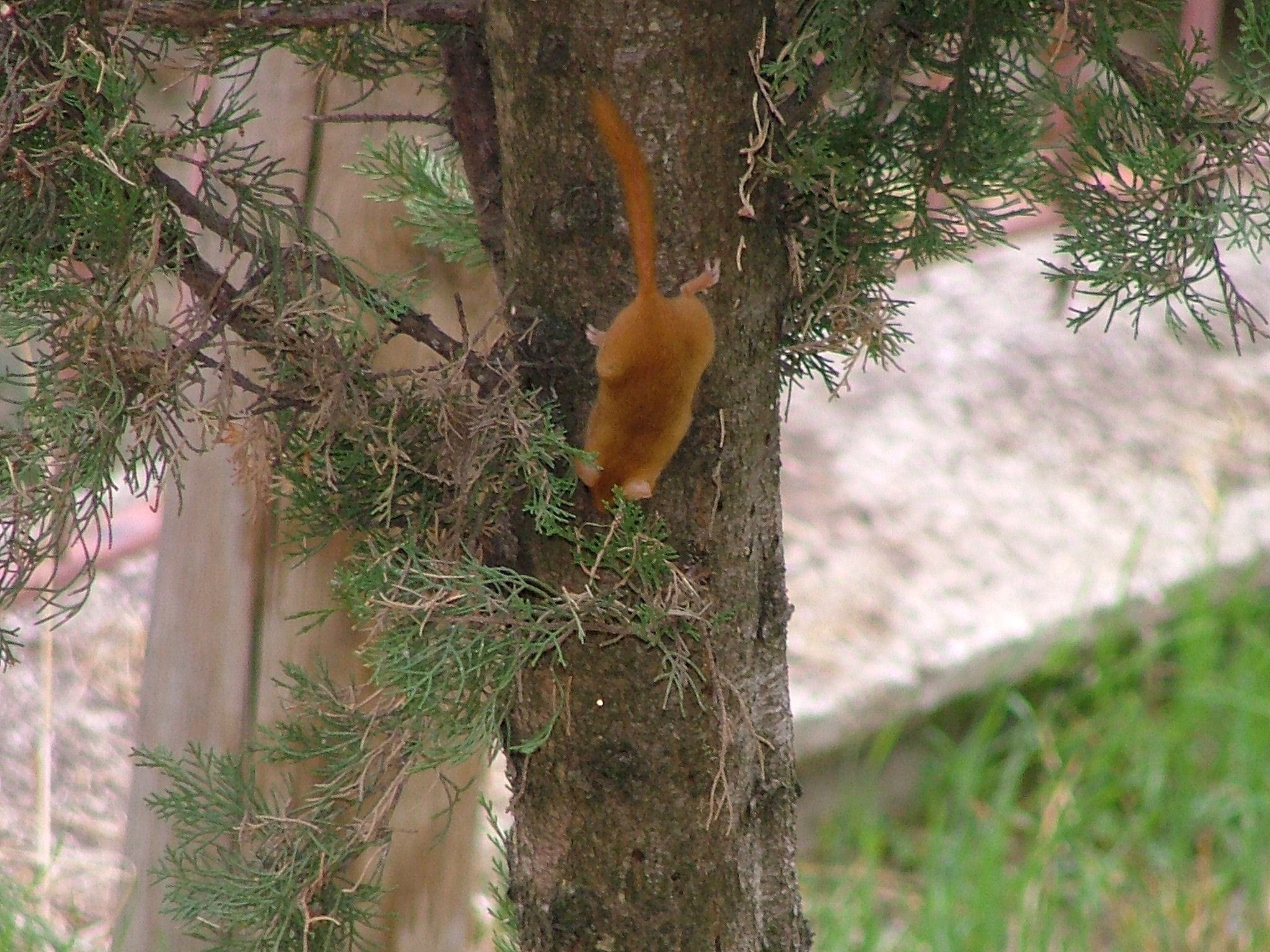 Muscardinus avellanarius, Moscardino, San Giorgio del Sannio , Località I Marzani (Benevento), Italia